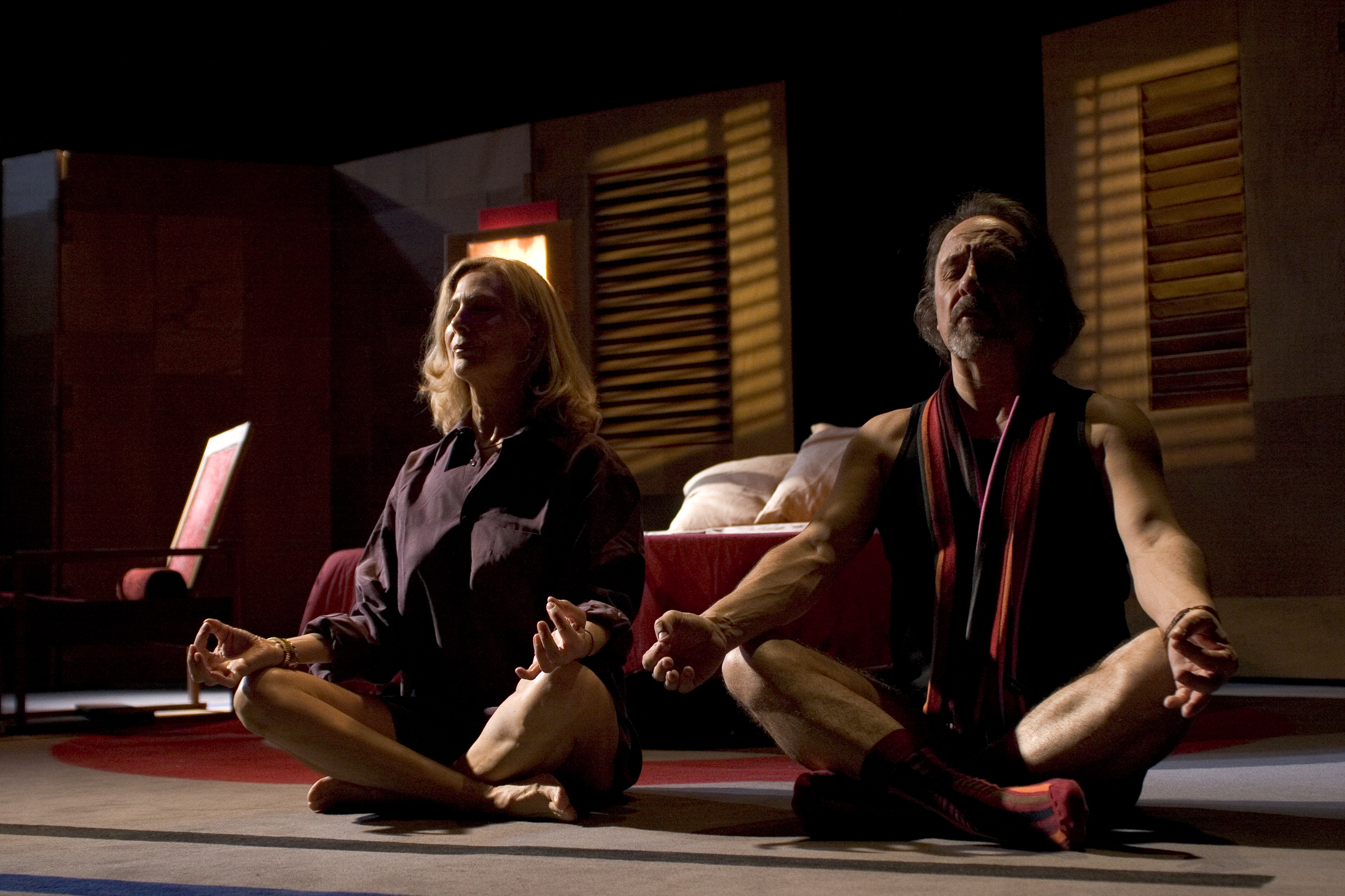 Jenny Arasse & Jean-Marc Chotteau dans la pièce de Philippe Madral, Effets de Nuit, au Théâtre de la Virgule, mars 2007